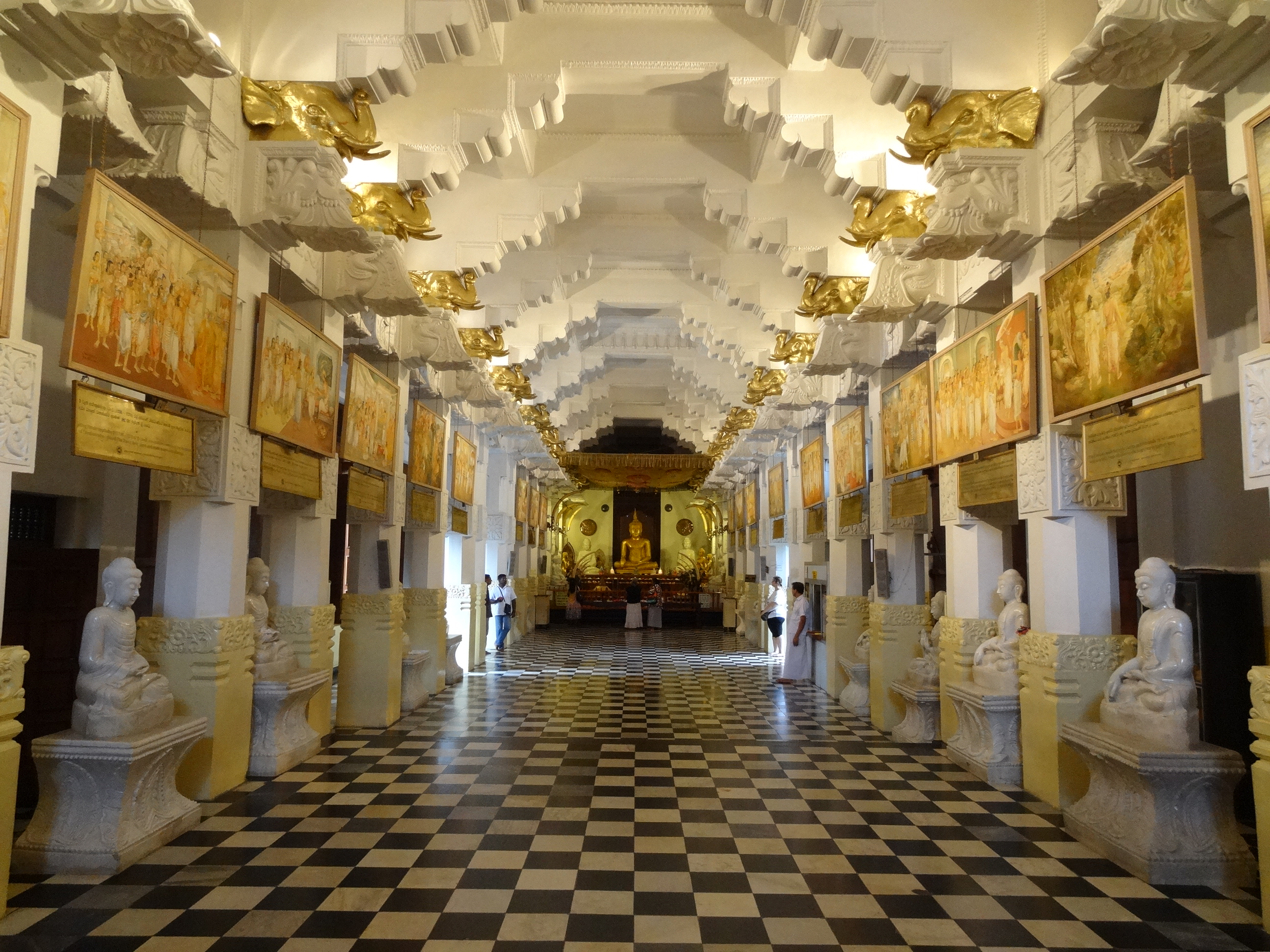 Sri Dalada Maligawa